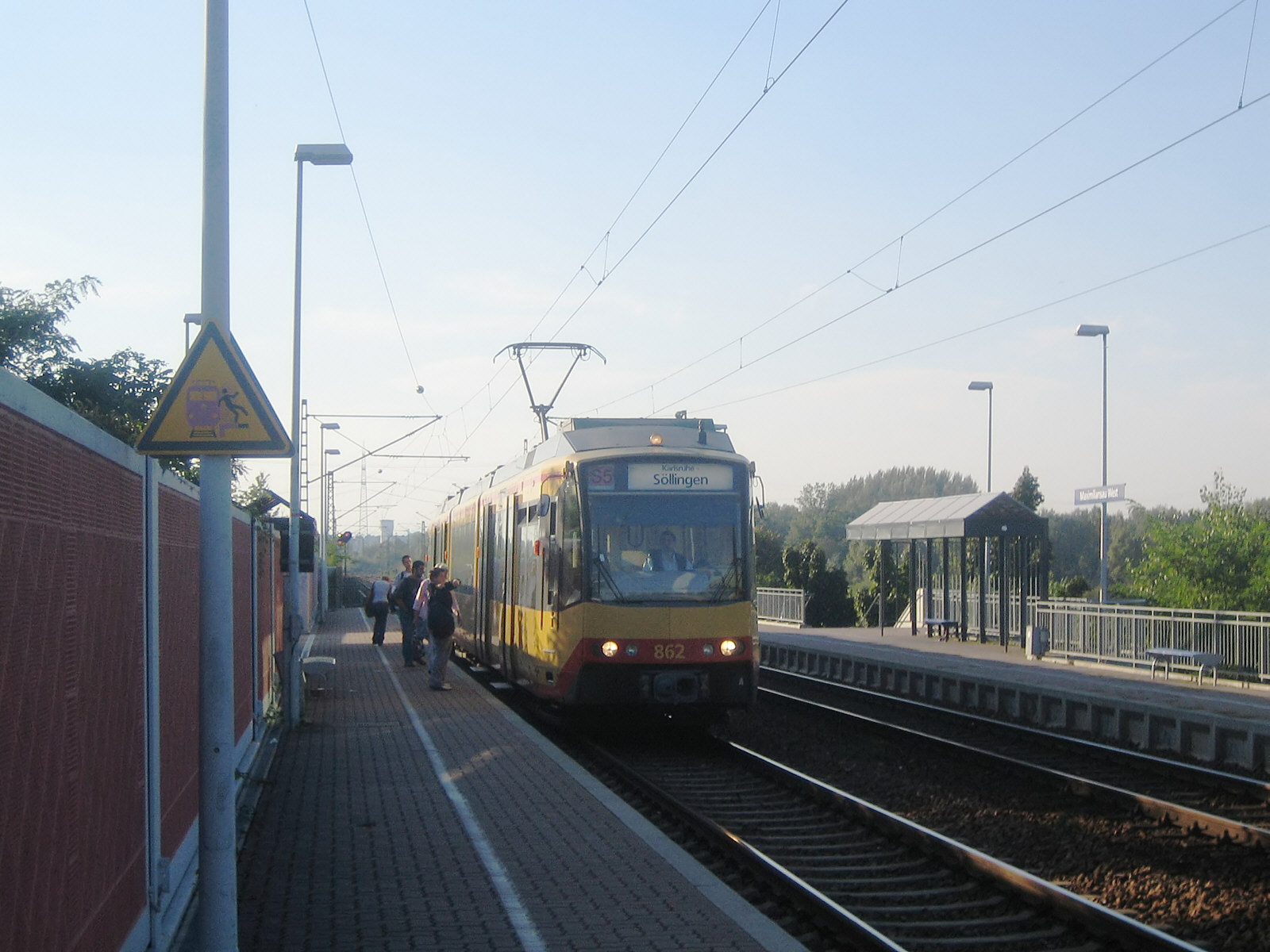 thumb|Original Bearbeitete Version von Image:Maximiliansauwest.JPG durch Smial: Schatten aufgehellt Original-Beschreibung: (Uploaded by Benutzer:AF666) Beschreibung, Quelle und Lizenz Stadtbahn am Haltepunkt "Maximiliansau West", selbst fotografiert Uploaded with Reworkhelper